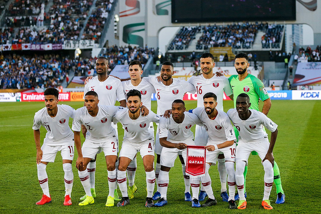 دیدار فینال جام ملت‌های 2019 آسیا بین تیم ملی فوتبال قطر و ژاپن بعدظهر جمعه 12 بهمن در ورزشگاه زاید به قضاوت روشن ایرماتوف ازبکستانی برگزار شد.المعزعلی در دقیقه 12 و عبدالعزیر حاتم 27 و اکرم عفیف در دقیقه 83 با ضربه پنالتی برای قطر گلزنی کردند.برای ژاپن مینامینو 69 موفق به گشودن دروازه قطر شدند.